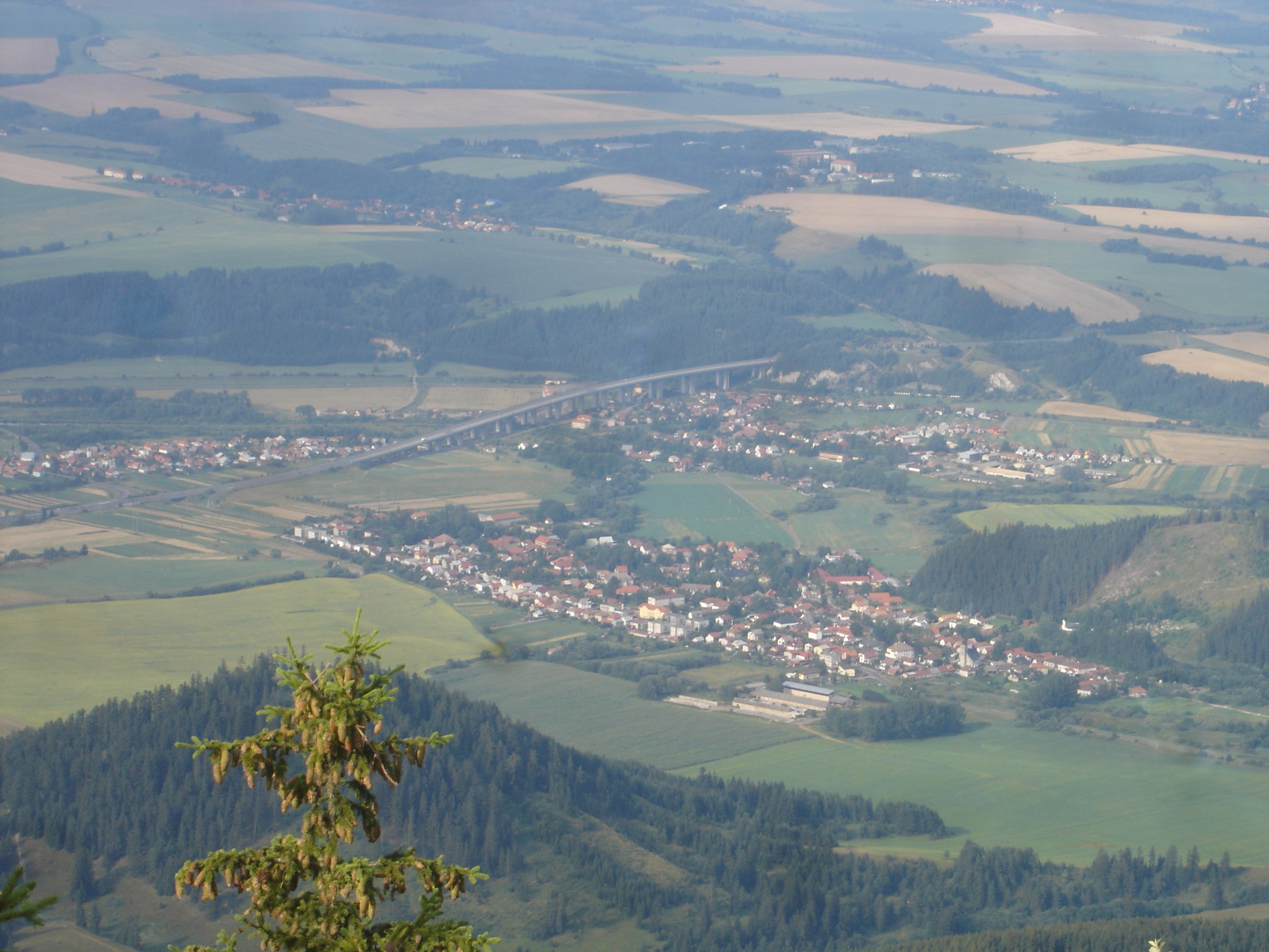 Liptovský Ján (center), Uhorská Ves (left), Podtureň (right). Slovensko.